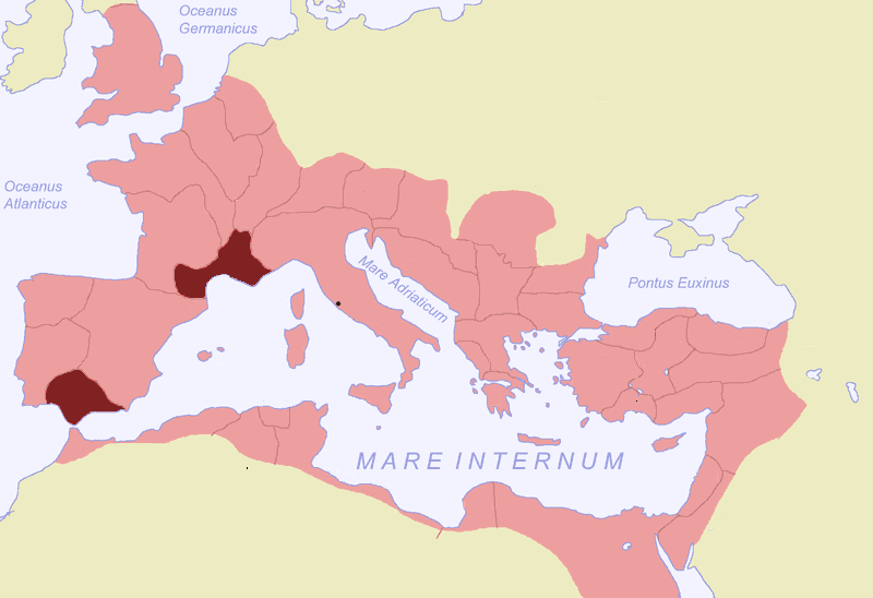 L'Empire romain avec la Bétique et la Narbonnaise en surlignées